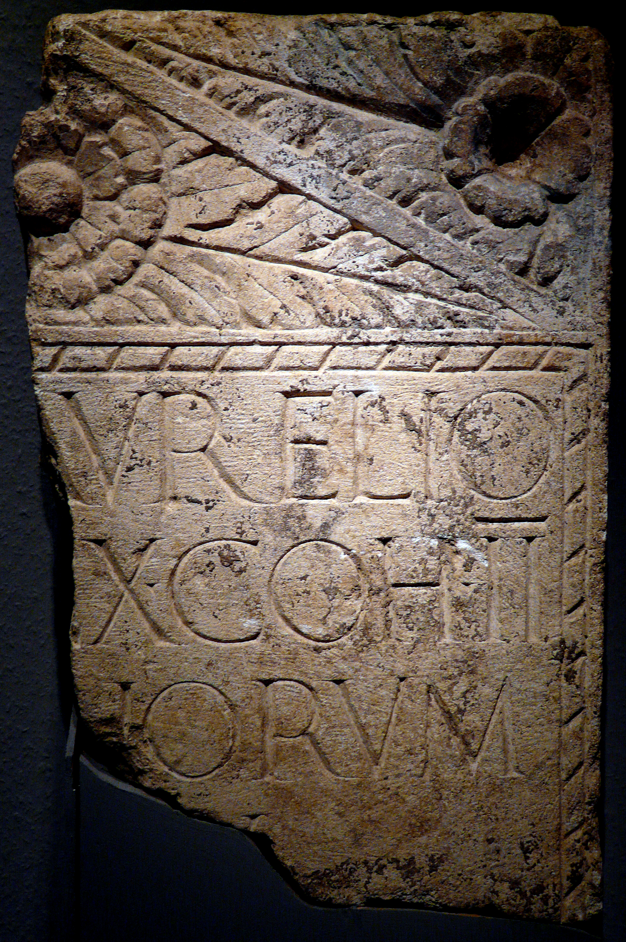 Römischer Grabstein aus Gelduba, Museum Burg Linn;Inschrift: (MARCO) AVRELIO (...V)EX/ILLARIO COH/ORTIS/II (VARCIA)NORVM (ANN/ORVM XX)XNach Bogaers-1978 p. 608 : Auxiliaria